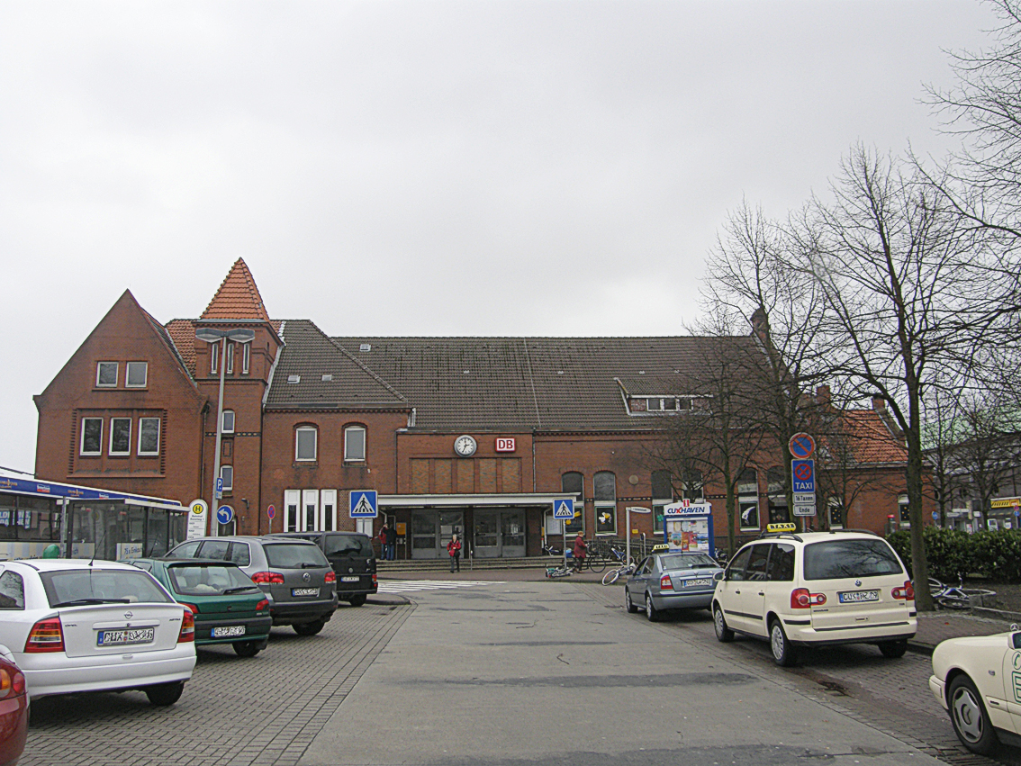 Der Cuxhaven Bahnhof von der Westseite gesehen